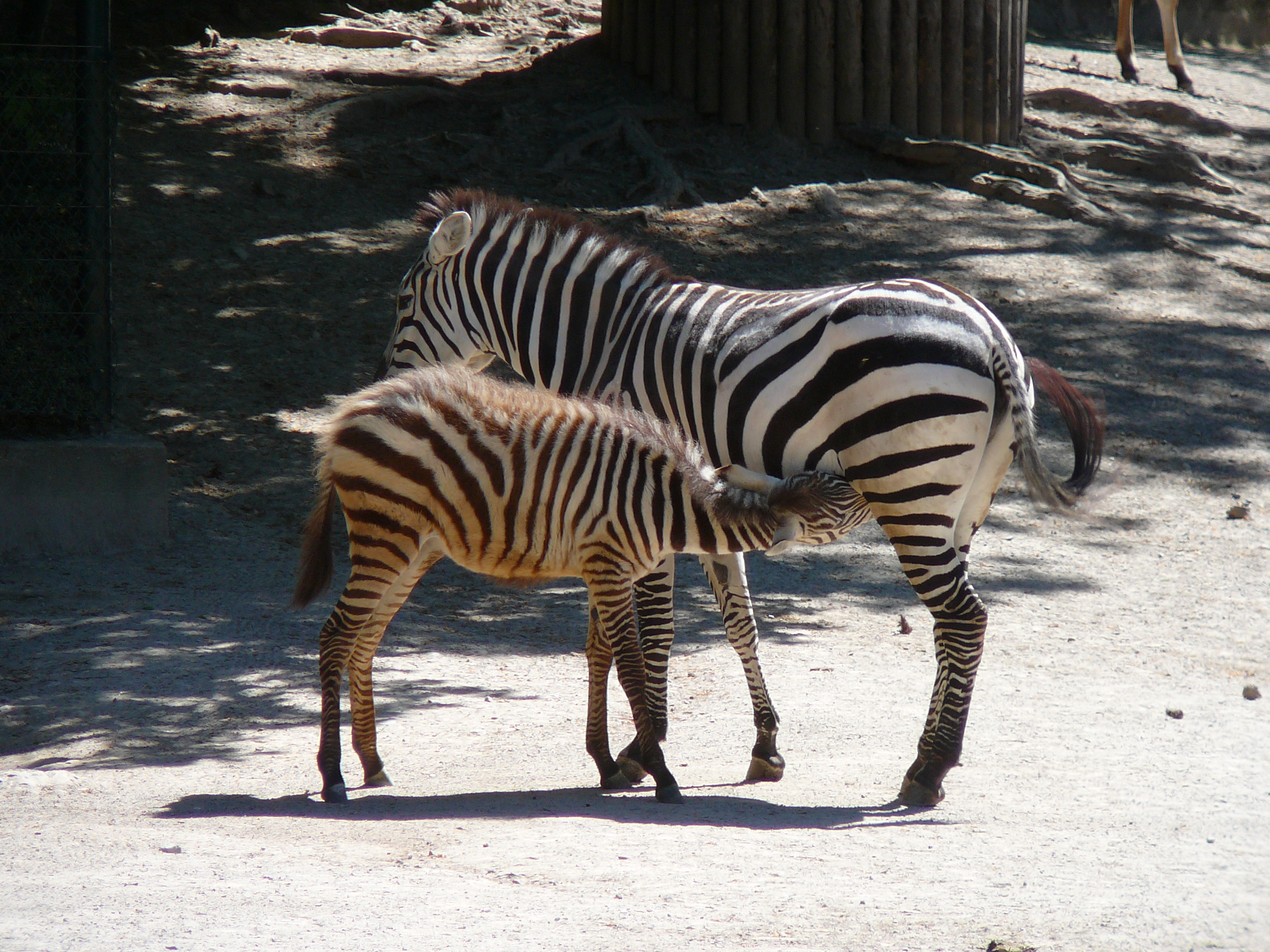 Equus quagga boehmi